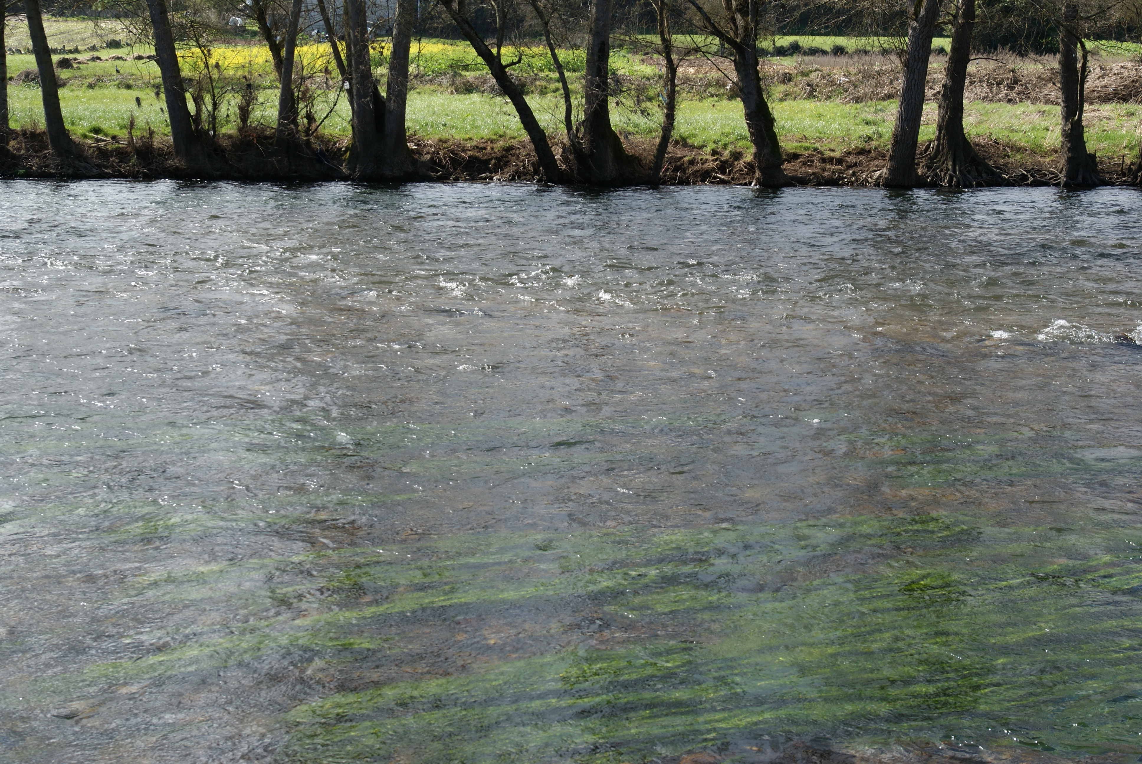 O río Neira no seu tramo baixo